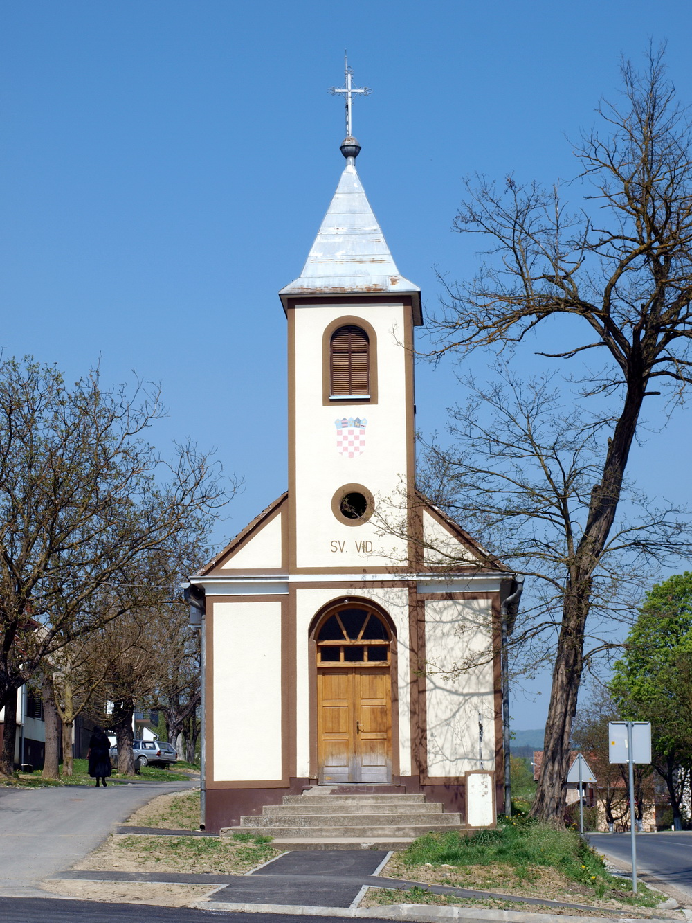 Crkva svetog Vida u selu Rastušje, Brodsko-posavska županija.